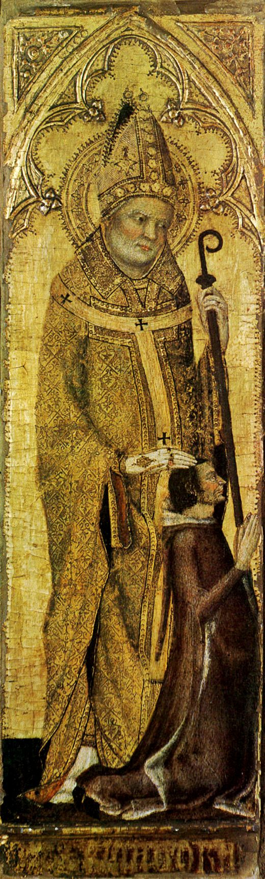 Saint Ermagora Matteo Giovannetti about 1345 Gold and tempera on panel, 55 x 18 cm Venice, Museo Correr